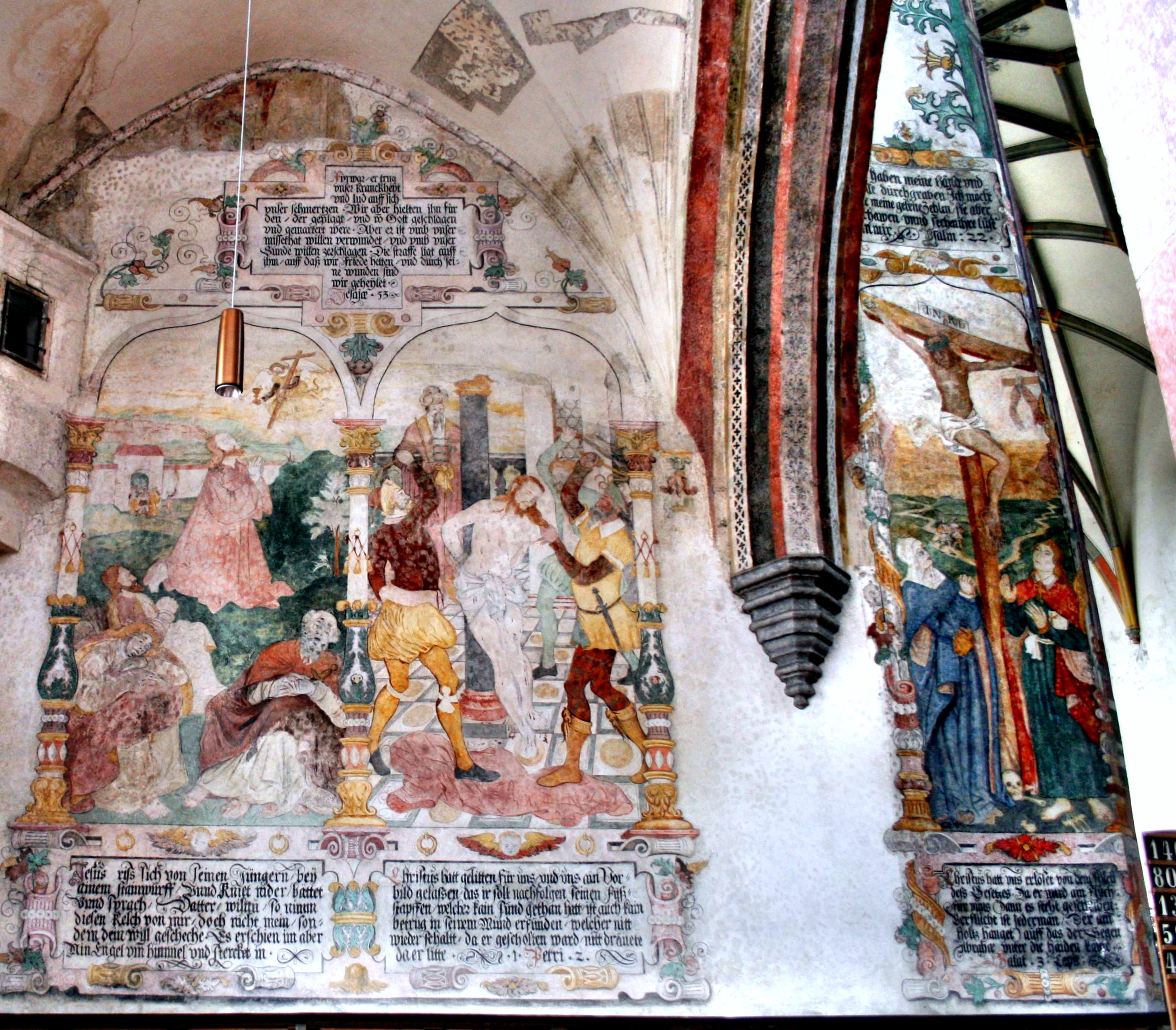 Passionszyklus in Nordschiff von 1588.